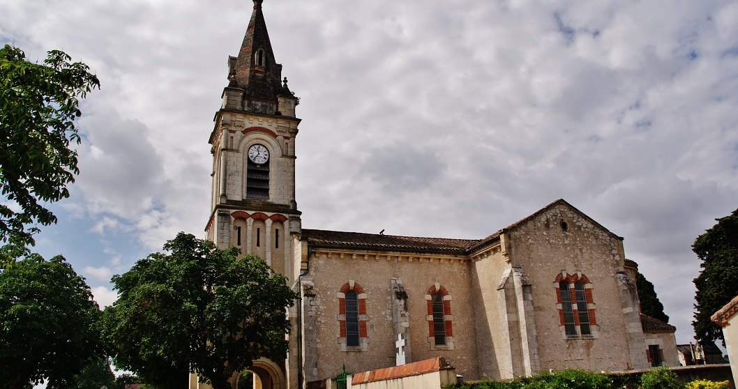 église St Roch